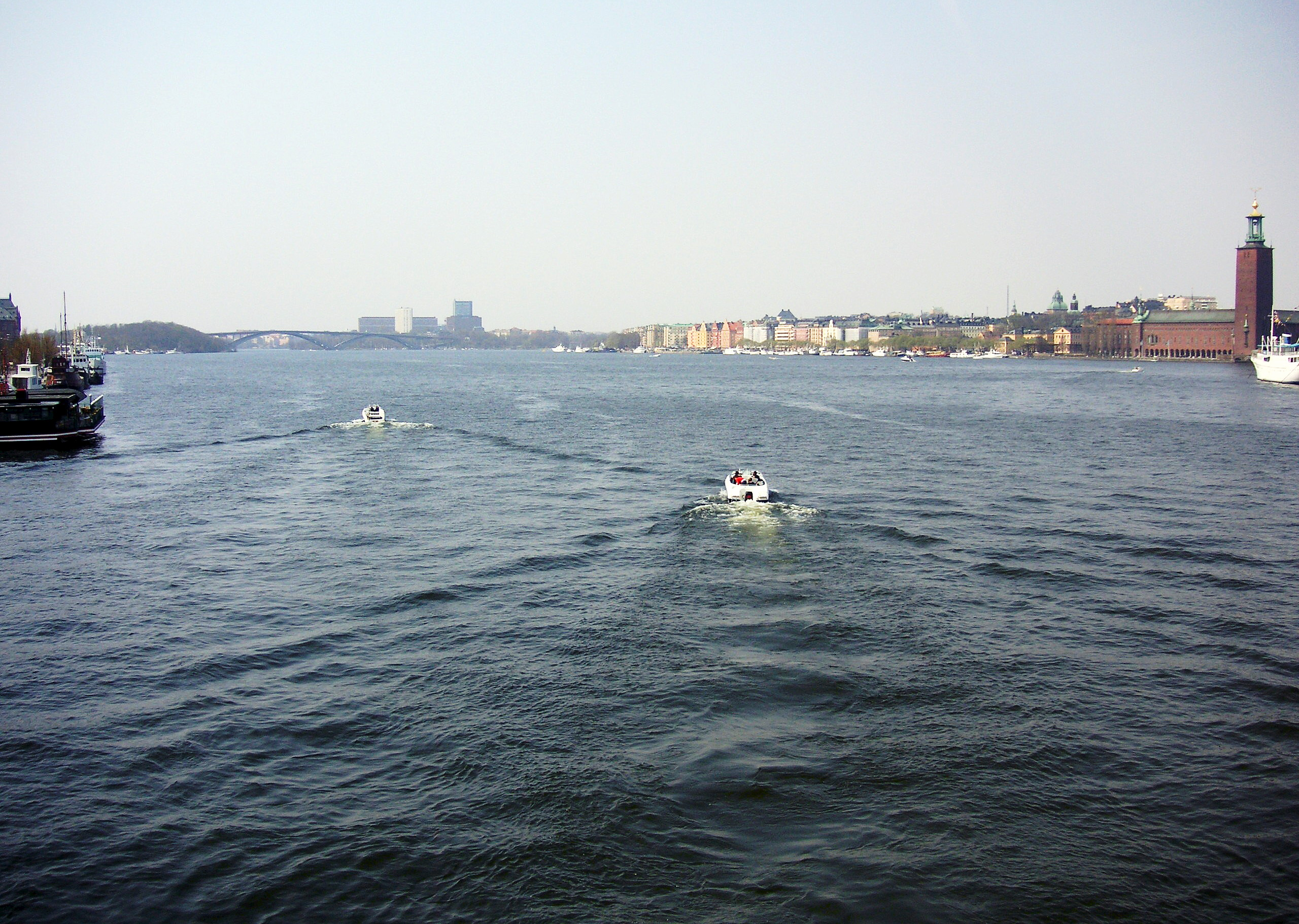 Riddarfjärden in Stockholm med Västerbron i bakgrunden